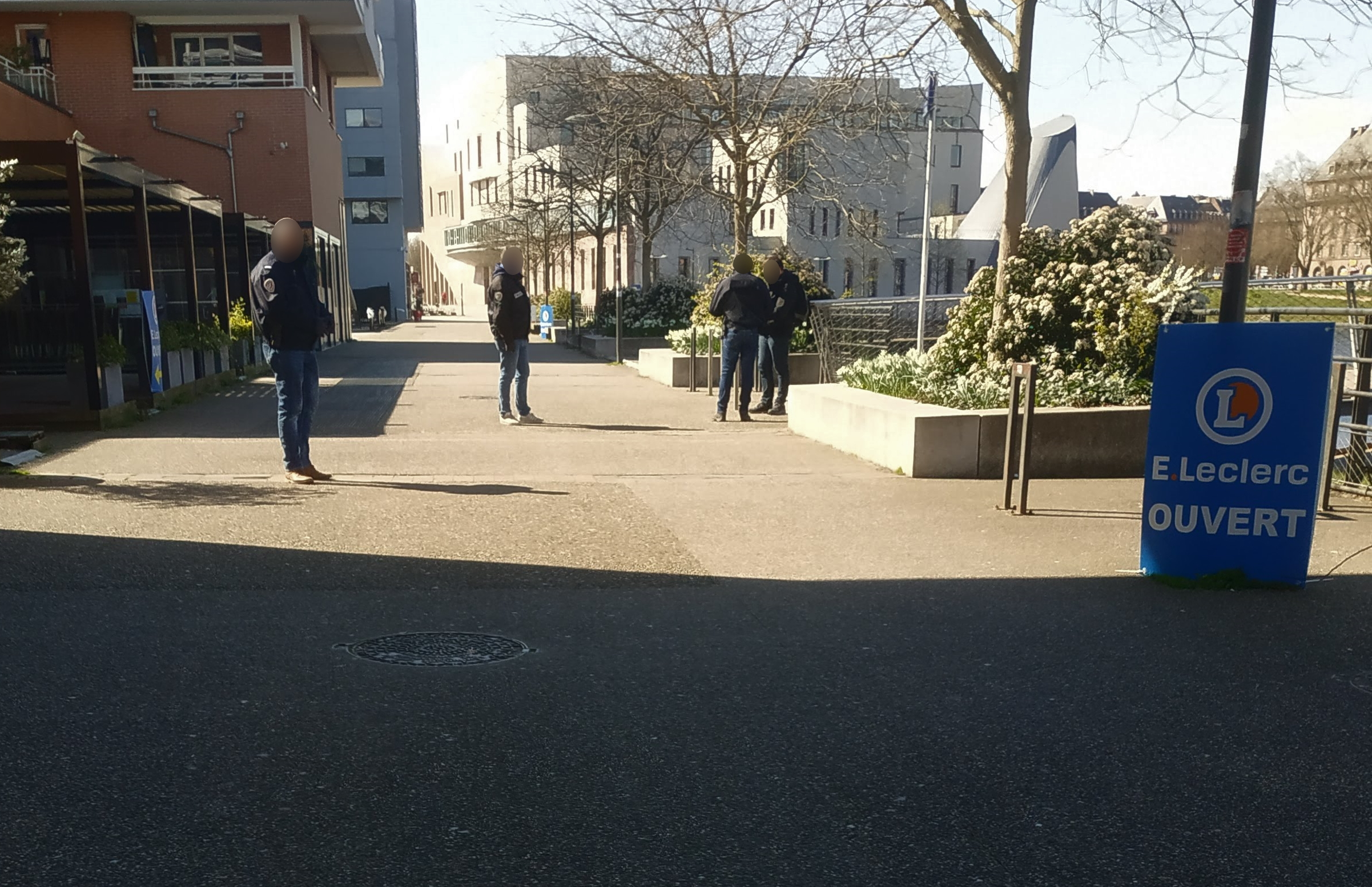 Dans le cadre du confinement de mars 2020, des policiers nationaux effectuent des contrôles des attestations dans les rues autour du Rivetoile